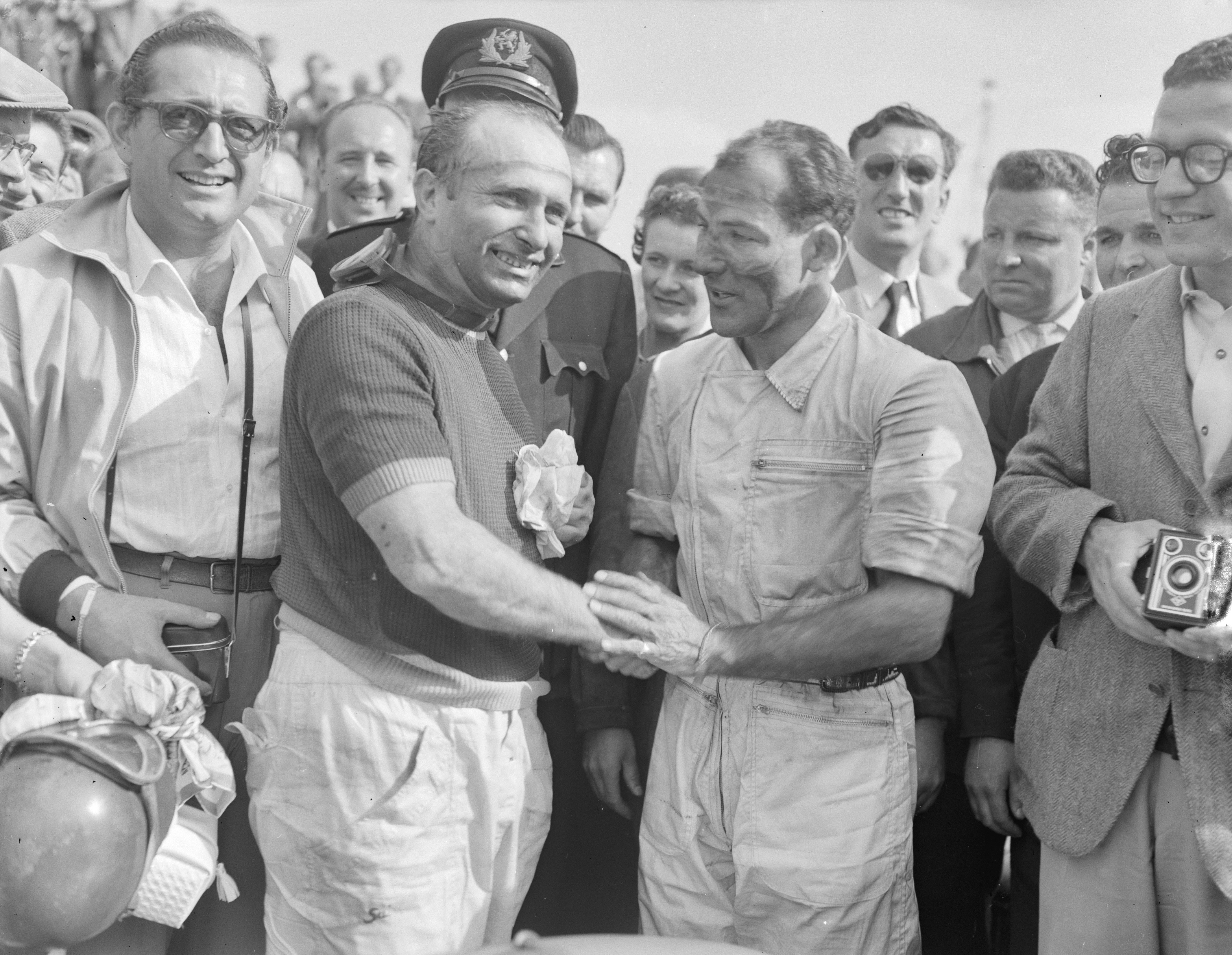 Collectie / Archief : Fotocollectie Anefo Reportage / Serie : [ onbekend ] Beschrijving : Grote Prijs van Nederland Zandvoort. De winnaar J. M. Fangio (links) wordt gefeliciteerd door zijn team collega Stirling Moss, beiden rijdend voor Mercedes Datum : 19 juni 1955 Locatie : Noord-Holland, Zandvoort Trefwoorden : auto's, coureurs, sport Persoonsnaam : Fangio J.M., Moss, Stirling Fotograaf : Pot, Harry / Anefo Auteursrechthebbende : Nationaal Archief Materiaalsoort : Negatief (zwart/wit) Nummer archiefinventaris : bekijk toegang 2.24.01.04 Bestanddeelnummer : 907-1900